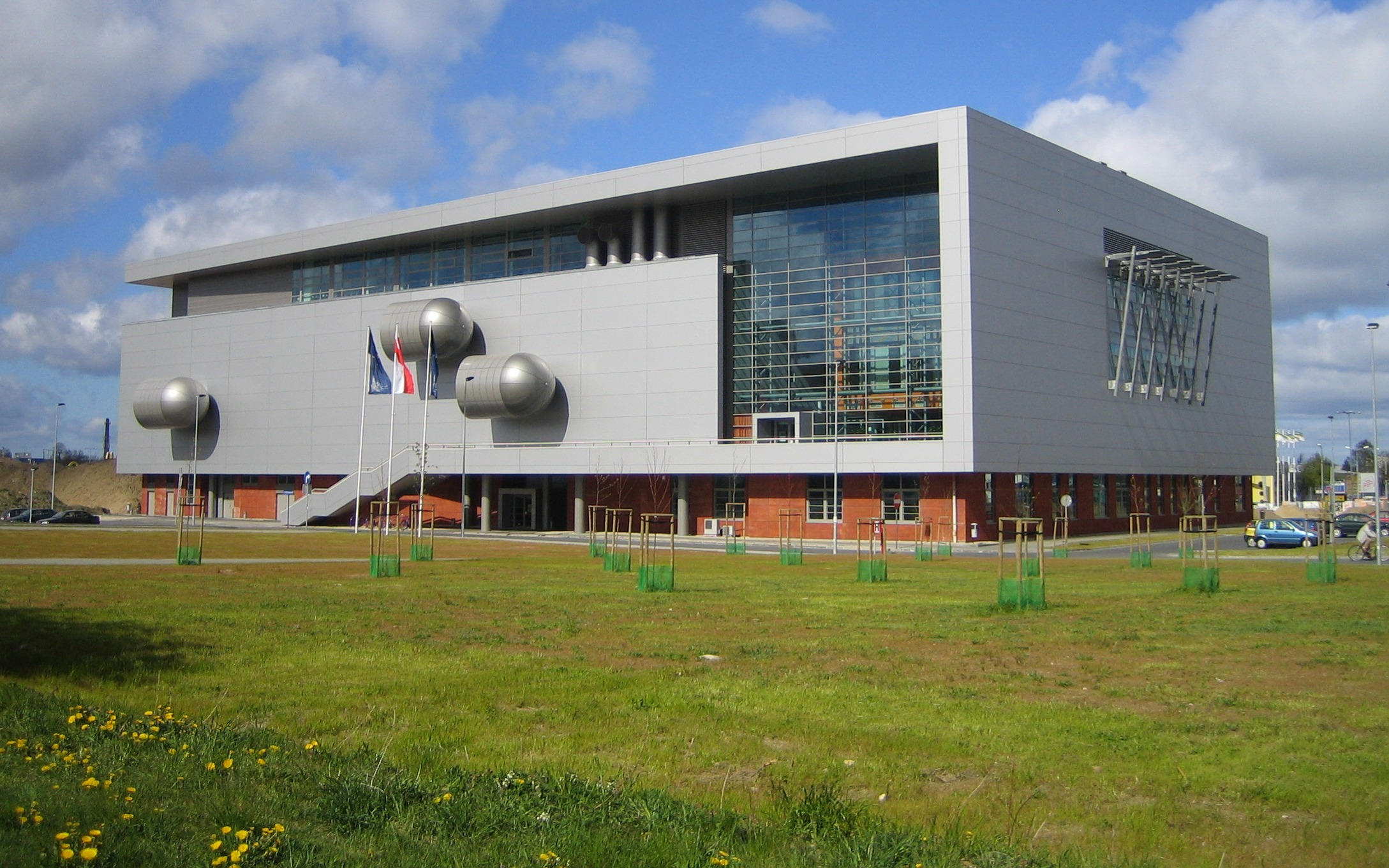 Biblioteka Uniwersytetu Gdańskiego w Gdańsku Oliwie, ul. Wita Stwosza 53. The Library of the University of Gdansk in Gdansk Oliwa